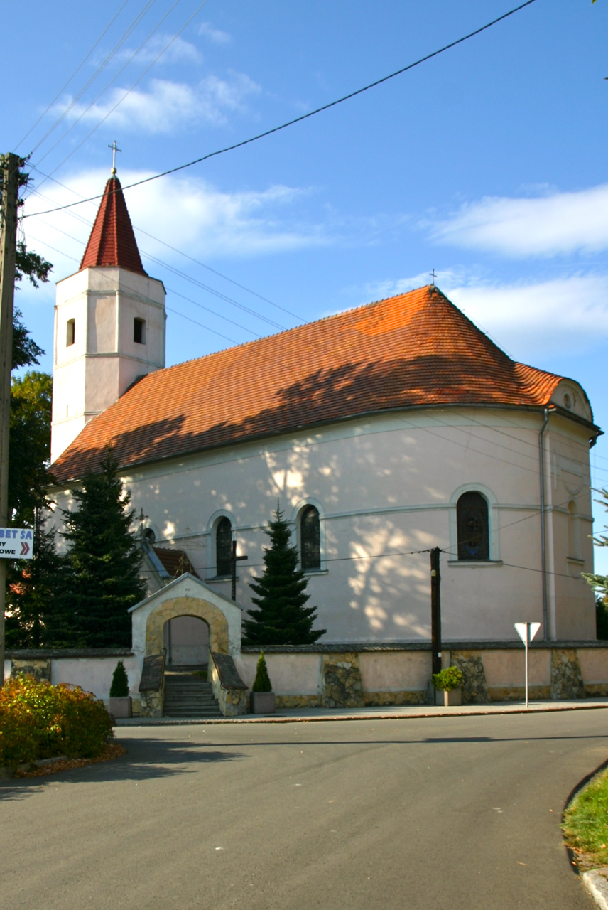 Lubrza (niem. Leuber) – kościół parafialny p.w. św. Jakuba, 1600, XVIII w. (zabytek nr 567/59 z 3.04.1959)